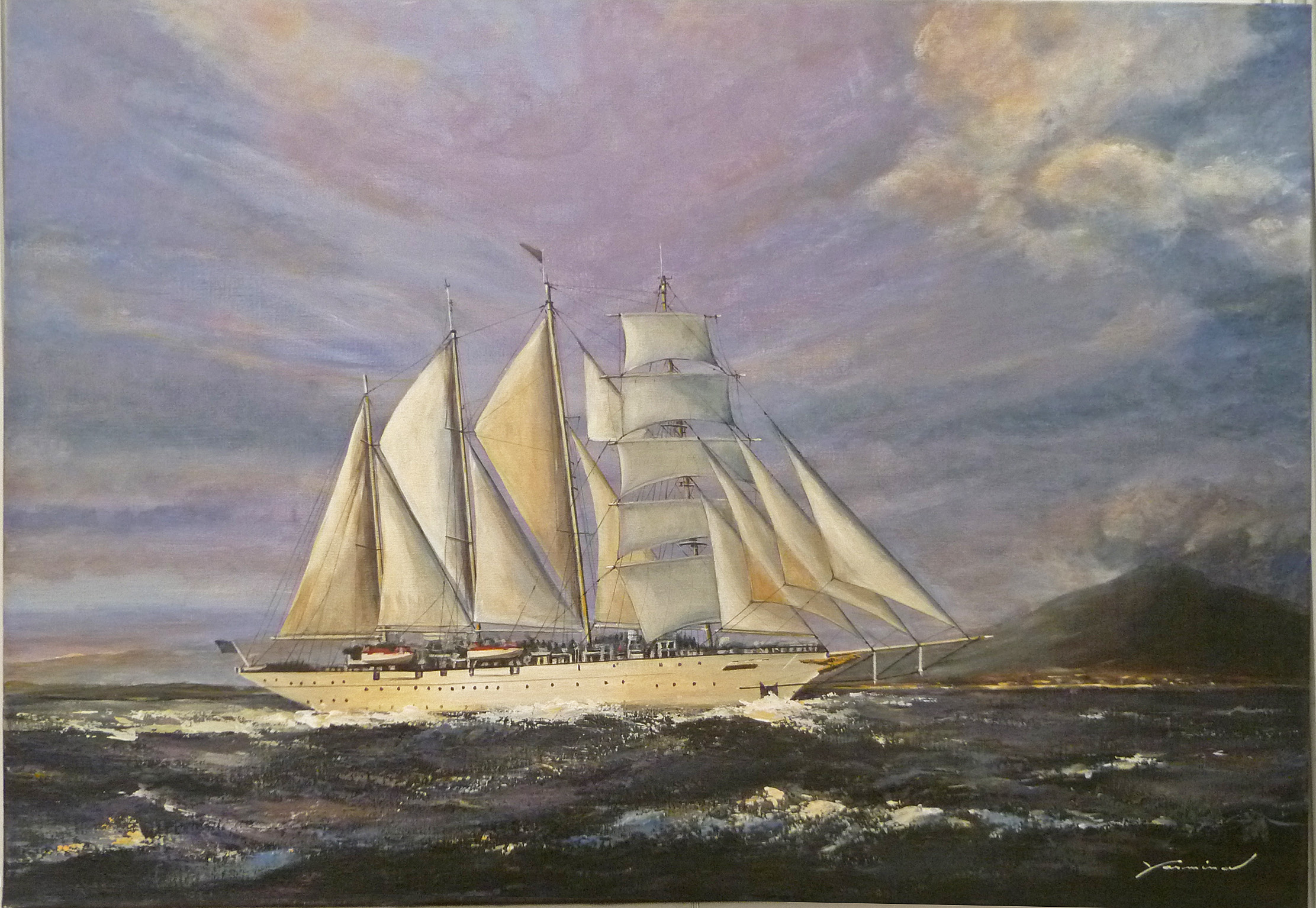 "Star Clipper", schilderij door de Belgische kunstenares Yasmina